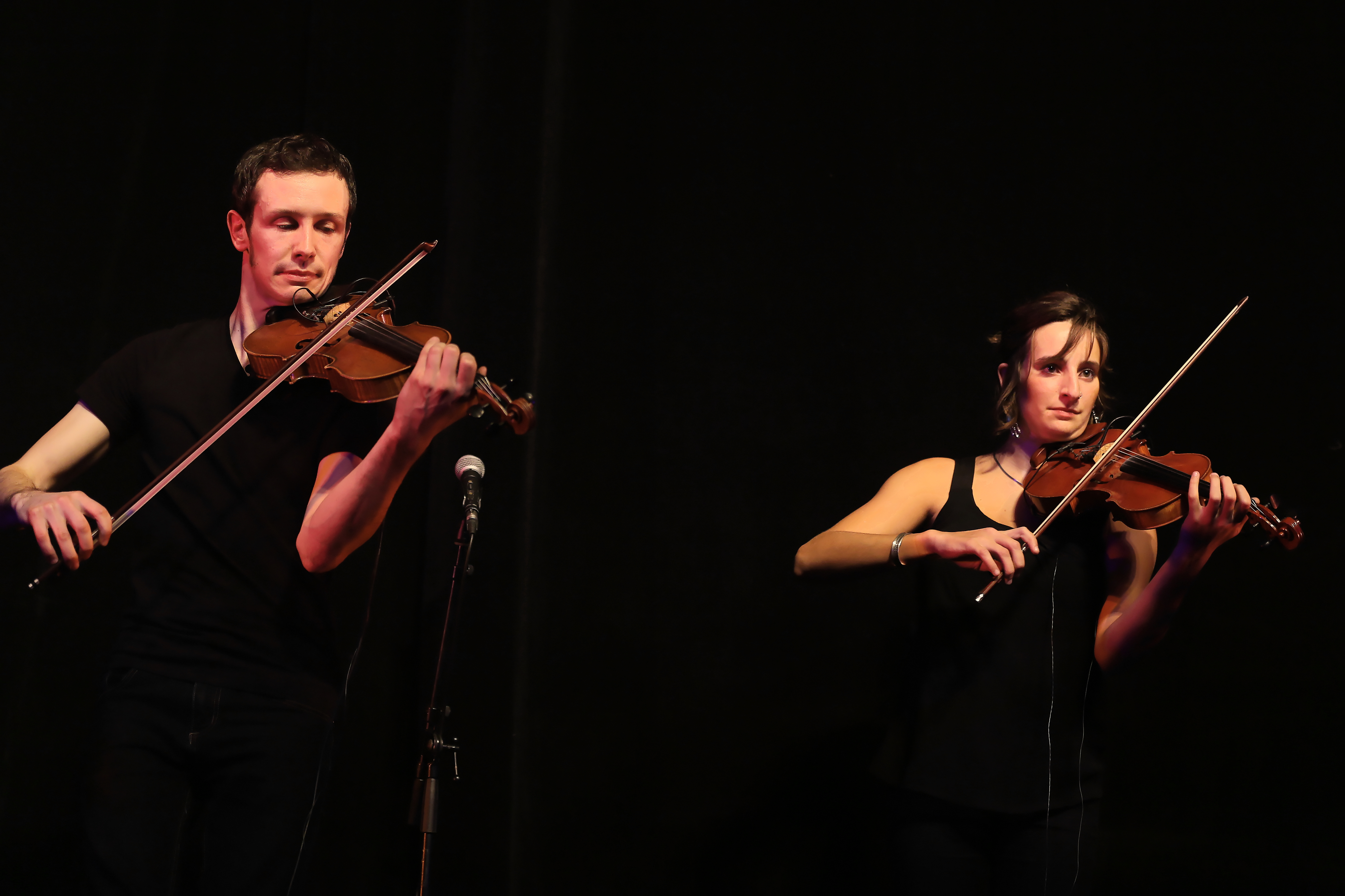 Dour/Le Pottier quartet en fest-noz lors du festival Yaouank le 21 novembre 2015 au Parc des Expositions de Rennes.